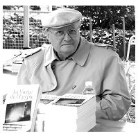 Le prêtre français François Brune (prêtre) à l'occasion du Salon du Livre d'Evreu en 2007